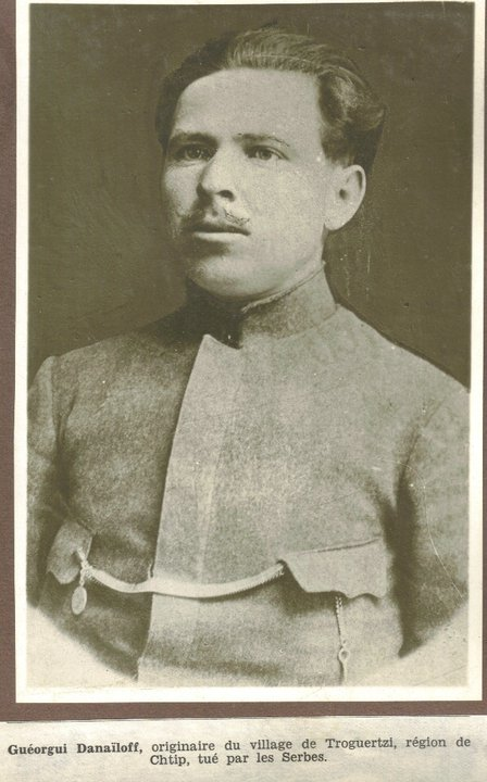 IMRO member Georgi Danailev